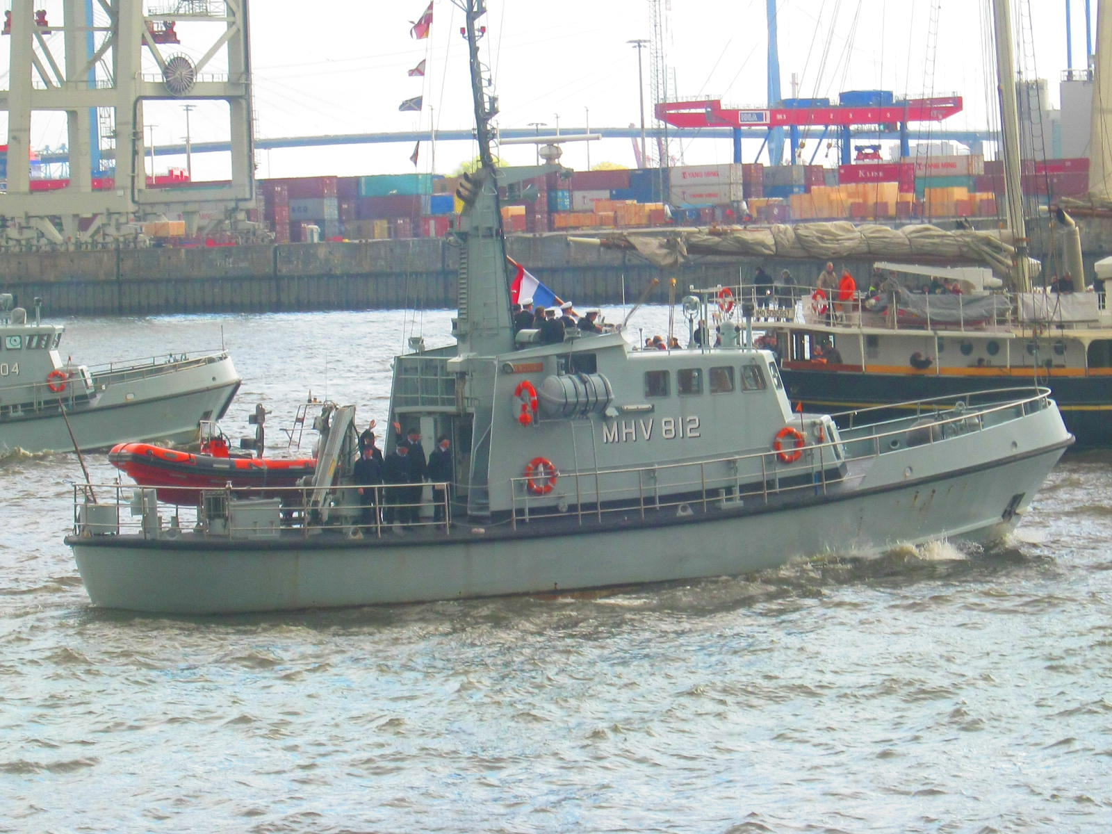 Das Schiff MHV812 Hercules der Dänischen Heimwehr bei der Auslaufparade des 823. Hafengeburtstages in Hamburg.